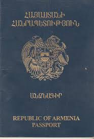 ՀՀ քաղաքացու անձնագիր